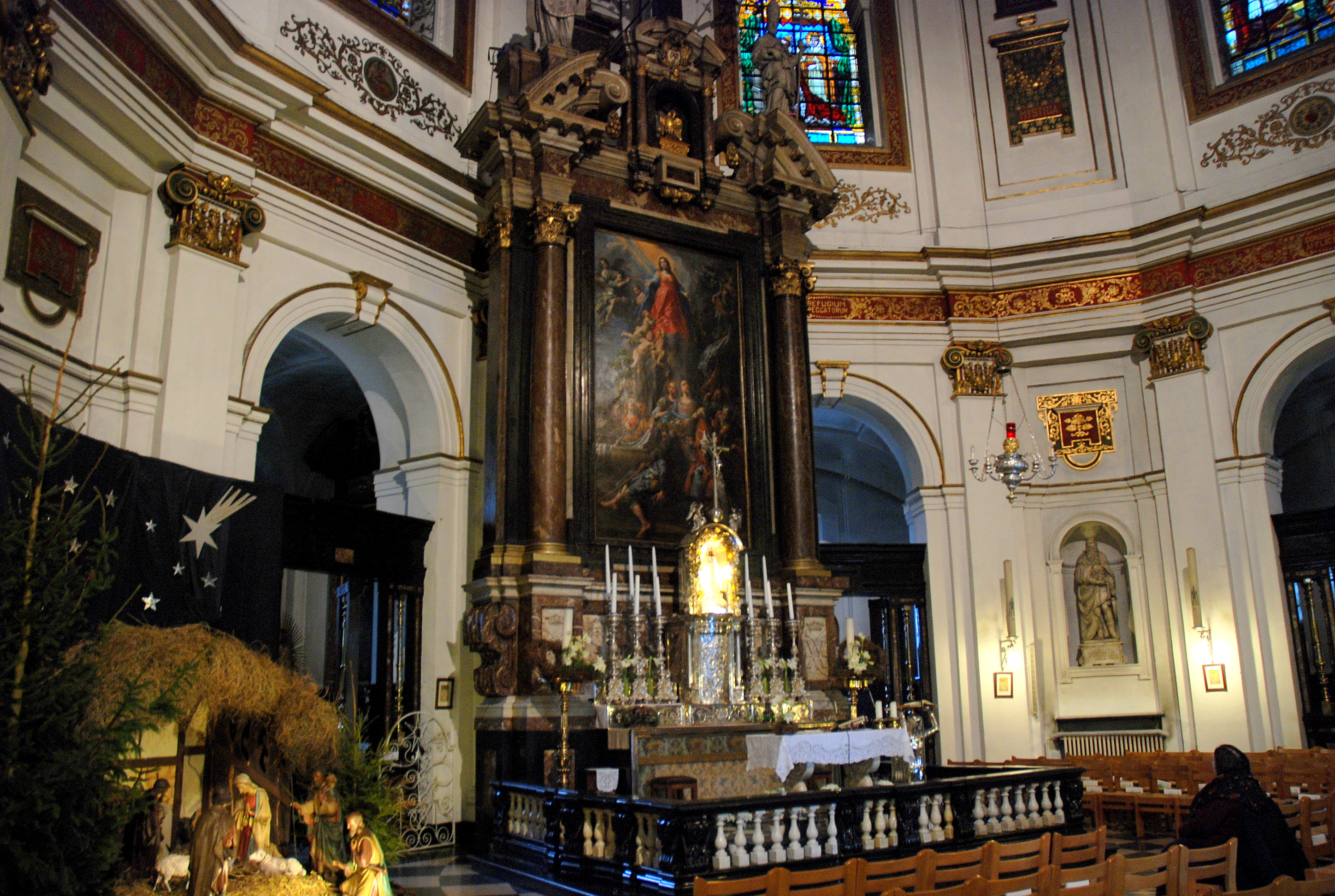 Schilderij van Theodoor Van Loon in de Onze-Lieve-Vrouwebasiliek te Scherpenheuvel, België